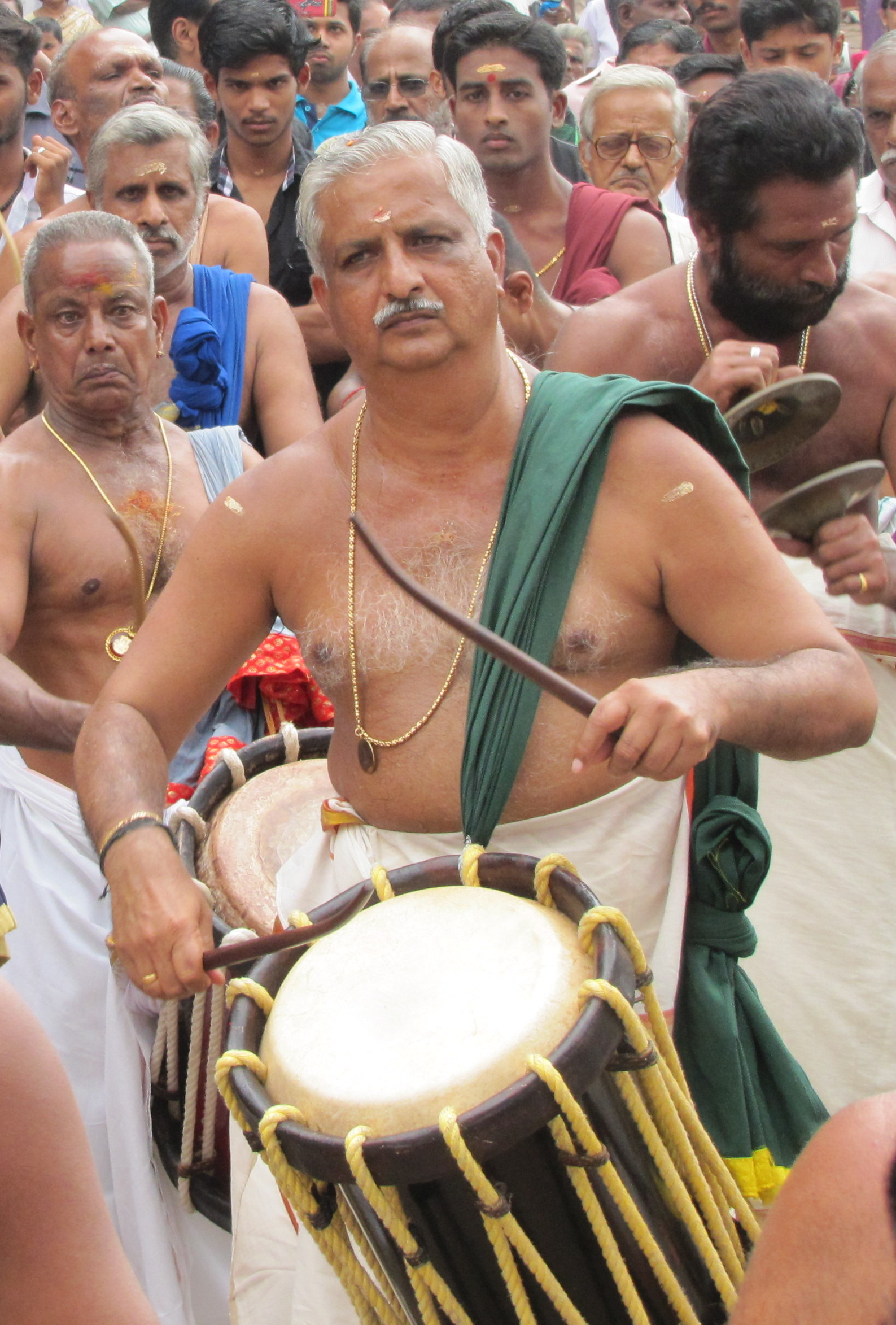 കേരളത്തിലെ പ്രശസ്തനായ ചെണ്ട കലാകാരനാണ് പെരുവനം കുട്ടൻ മാരാർ. തൃശൂർ ജില്ലയിലെ പെരുവനം സ്വദേശി. തൃശ്ശൂർ പൂരത്തിലെ ഇലഞ്ഞിത്തറ മേളം അടക്കം കേരളത്തിലെ പ്രശസ്തമായ പല ഉത്സവങ്ങൾക്കും മേള പ്രമാണി. ഭാരത സർക്കാർ 2011-ൽ പത്മശ്രീ നൽകി ഇദ്ദേഹത്തെ ആദരിച്ചിട്ടുണ്ട്. ചിത്രം 2012 തൃശ്ശൂര്‍ പൂരം കൊടിയേറ്റത്തോടനുബന്ധിച്ച് പാറമേക്കാവിനുമുമ്പില്‍ നടന്ന മേളത്തില്‍ നിന്ന്.